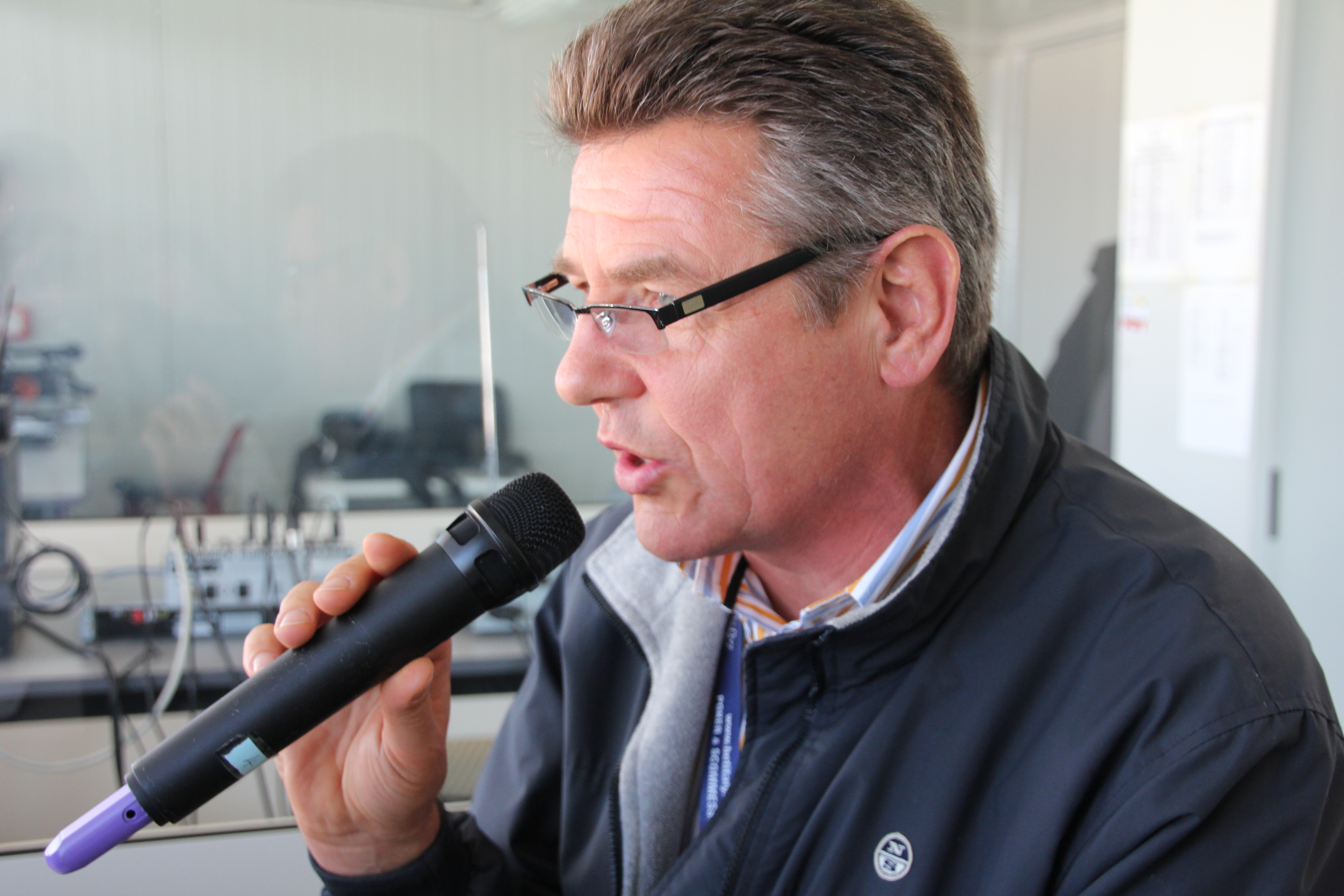 Luigi Vignando nell'attività di Speaker